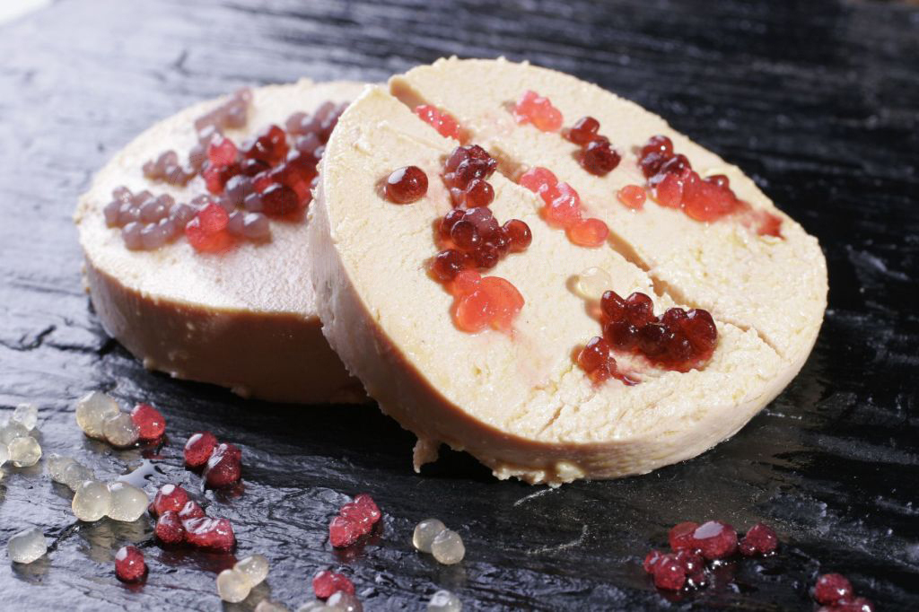 Foie_gras_caviar_de_vénus1©.jpg